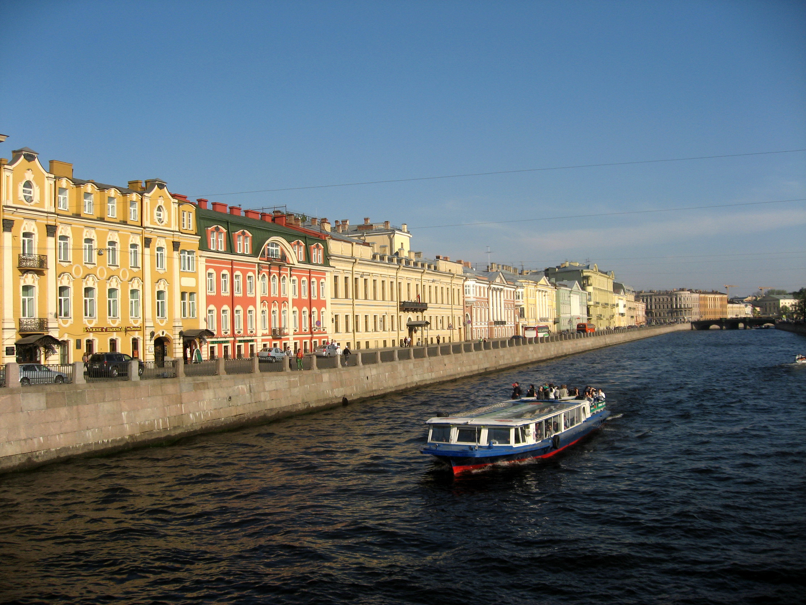 Sankt-Petěrburg